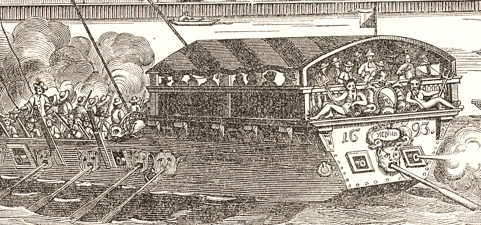 Neptun (1693) Kopie nach dem Neujahrsblatt der Constaffler und Feuerwerker im Zeughaus von Johannes Meyer aus dem Jahr 1694, detaillerte Beschreibung siehe Scan vom Buch